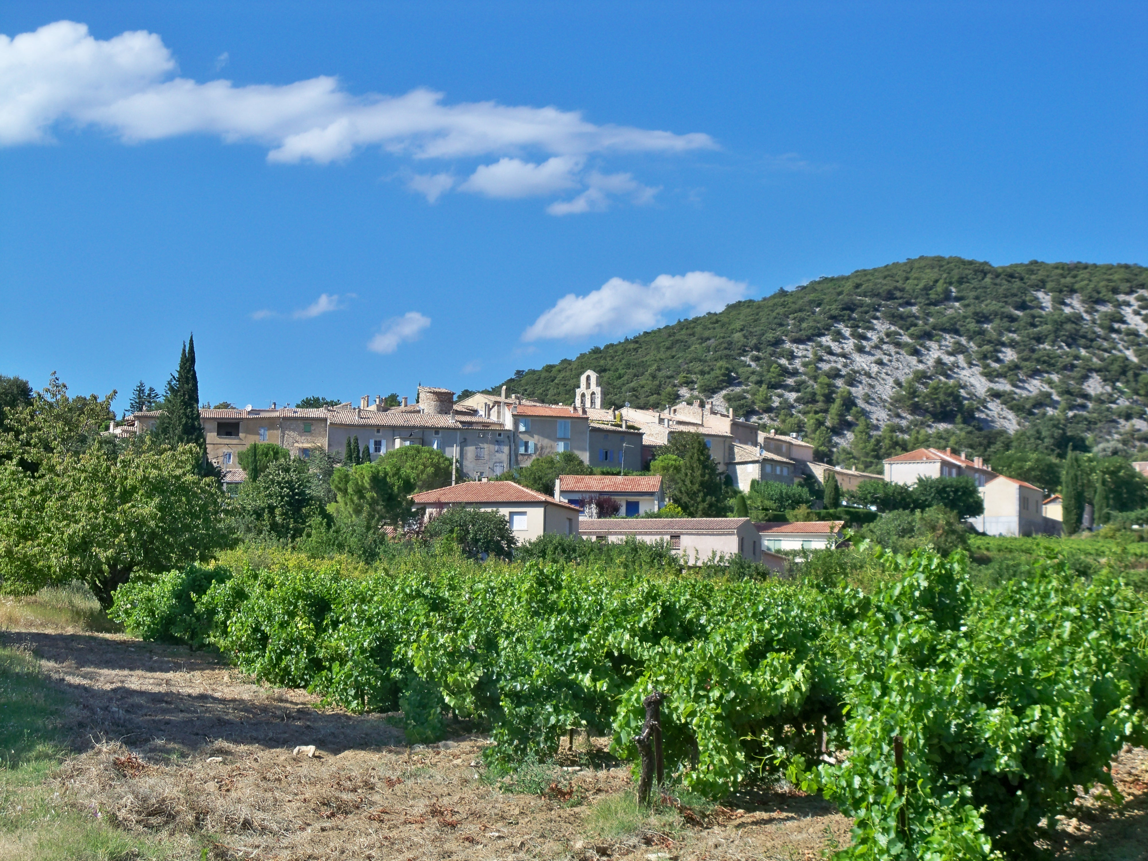 Village de Rousset les Vignes, Drôme, France